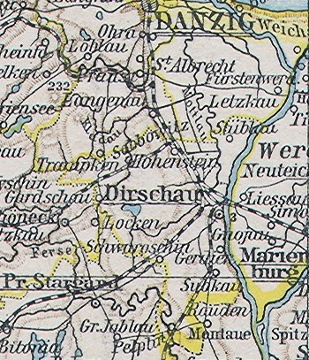 Kreis Dirschau, Ausschnitt aus